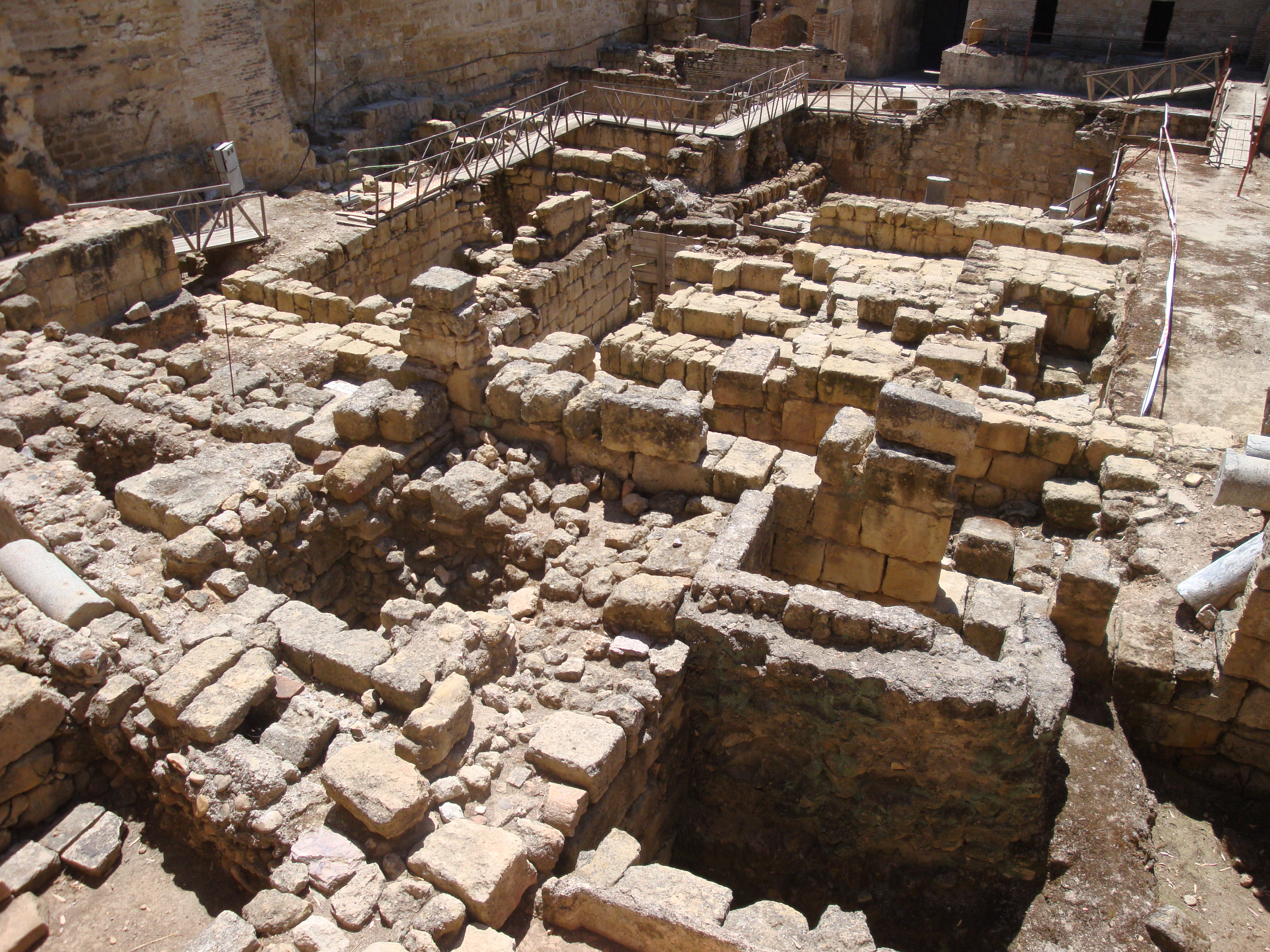 Patio de las Mujeres del Alcázar de los Reyes Cristianos, Córdoba (España).